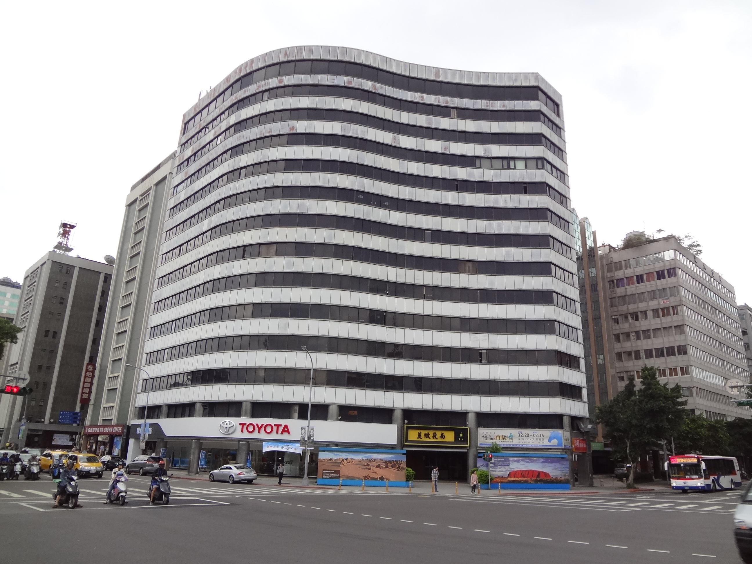 三傑大廈，位於臺北市松山區八德路三段，三傑建設建造，徐嘉彰設計。